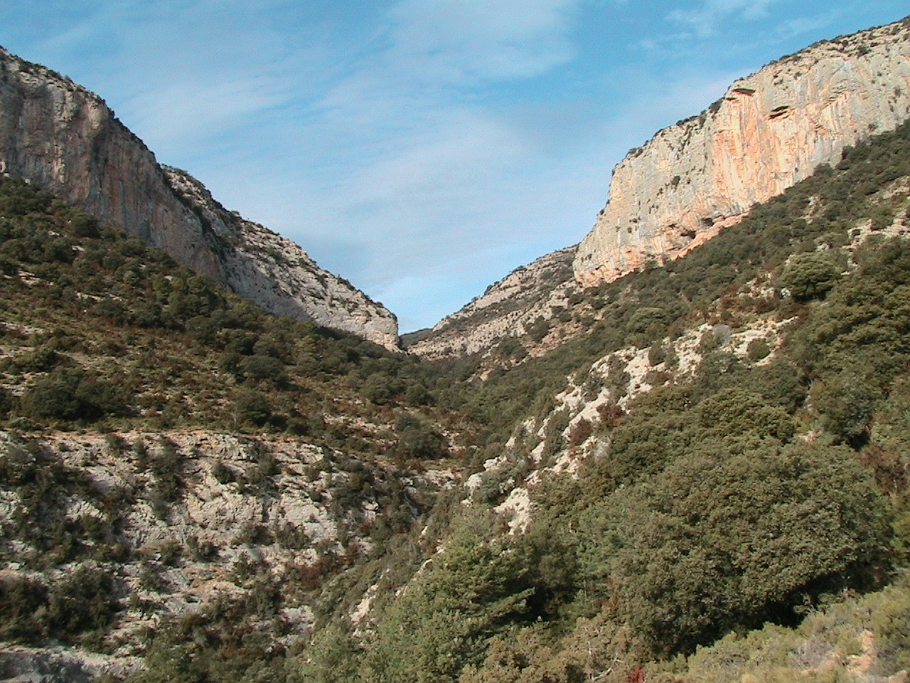 Els cingles de lo Tamany (a la dreta de la foto), tanquen el barranc de Cuba per llevant (Vilanova de Meià - Noguera - Catalunya)